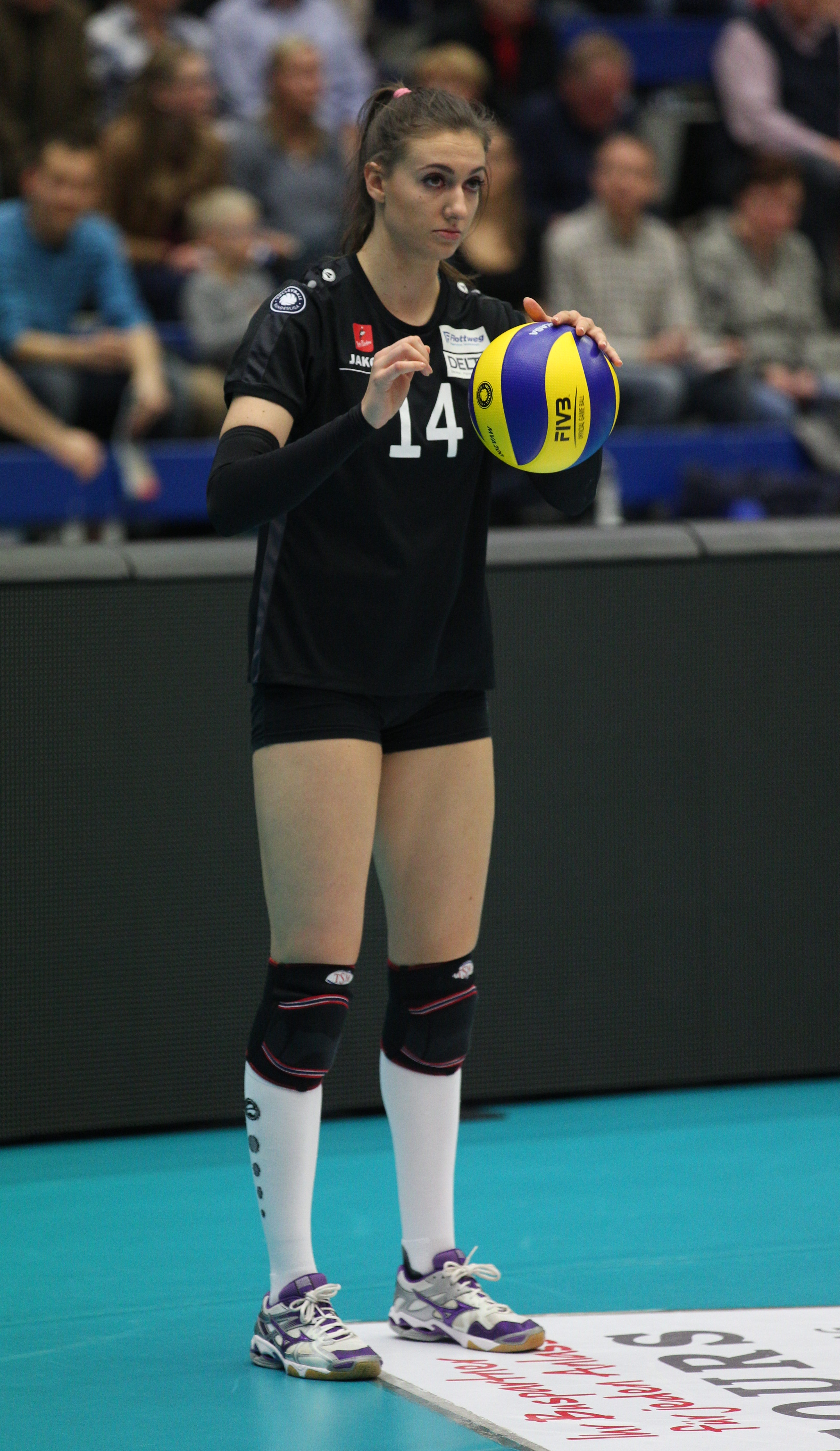 Lena Stigrot beim Play-off-Viertelfinale Dresdner SC gegen Rote Raben Vilsbiburg, 18. März 2017